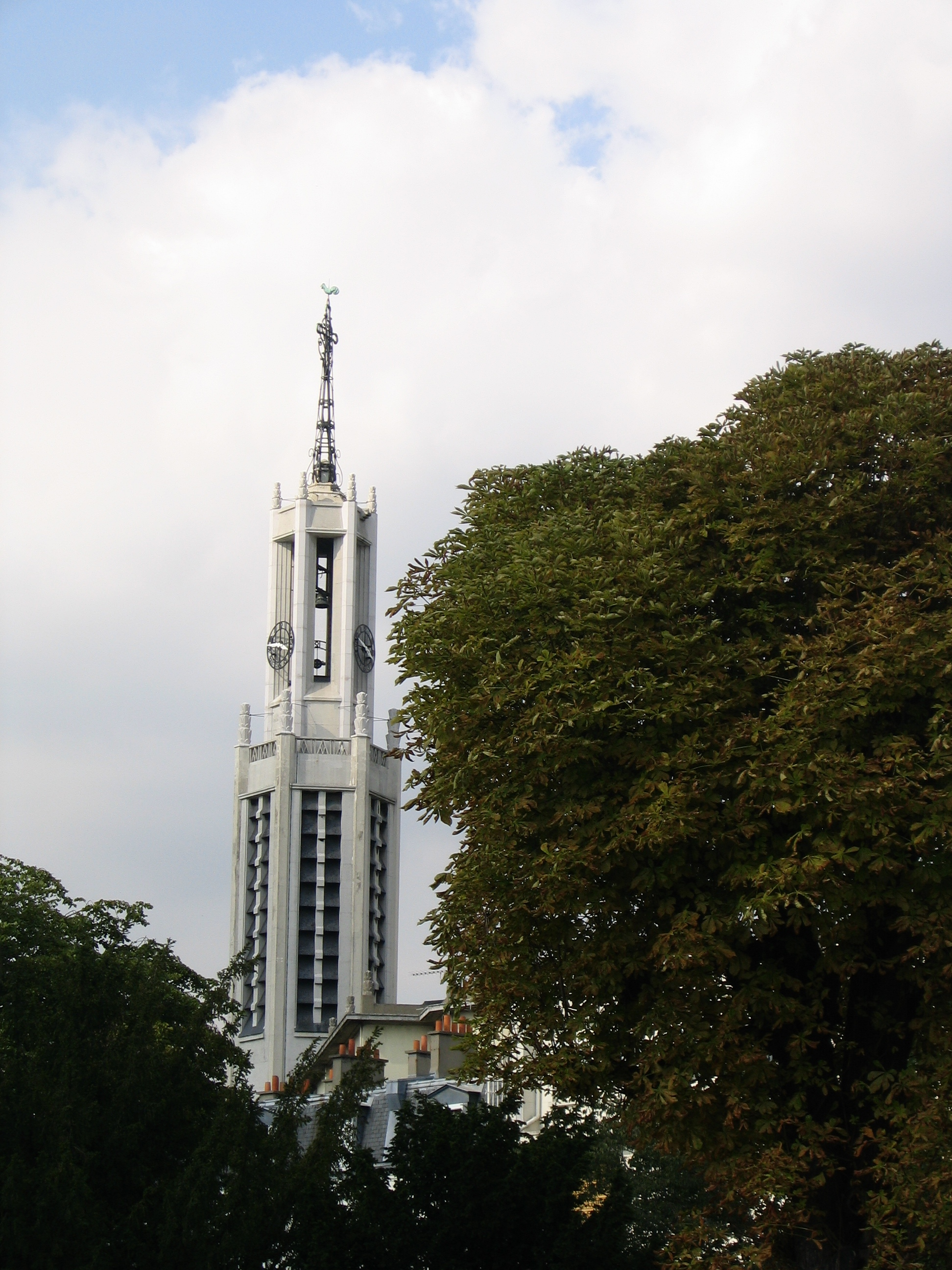 L’Église Sainte-Agnès de Maisons-Alfort vue de l'école vétérinaire